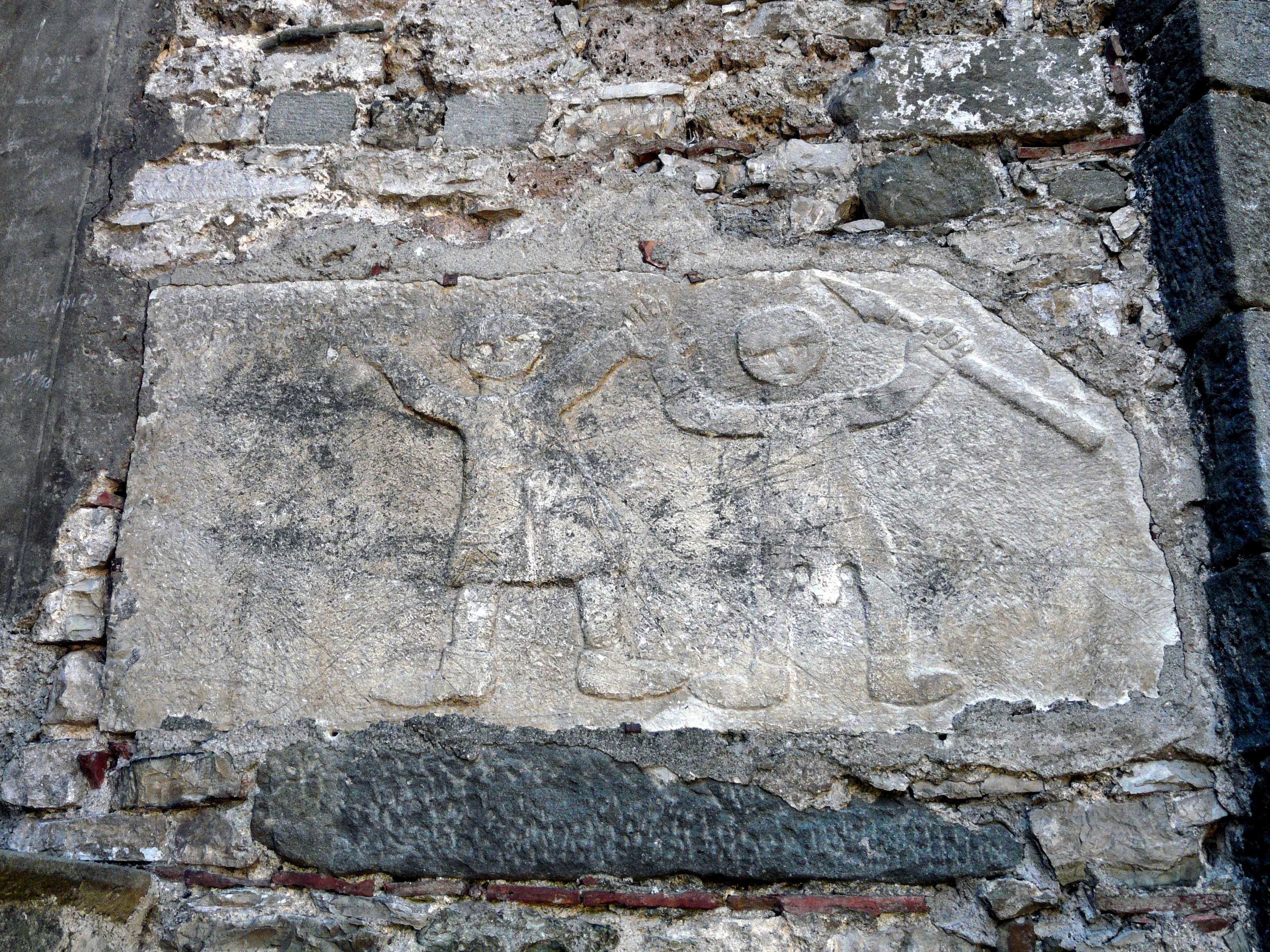 Lapide presso la pieve di San Pietro Porta, Careggine, Toscana, Italia